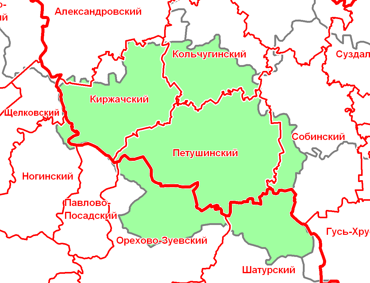 Покровский уезд в современной сетке районов.